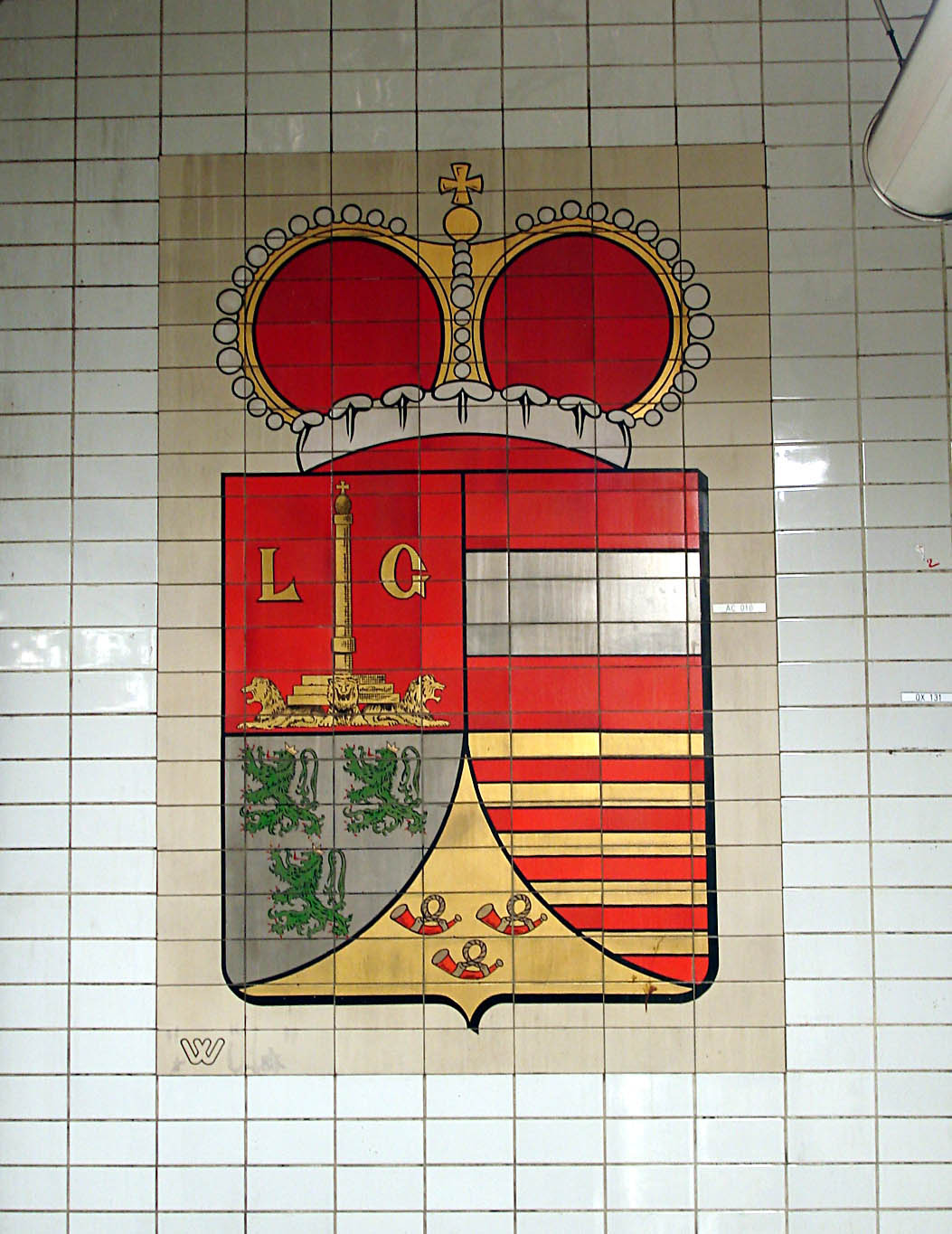 Station Liège, de la ligne 13 du métro de Paris, France.